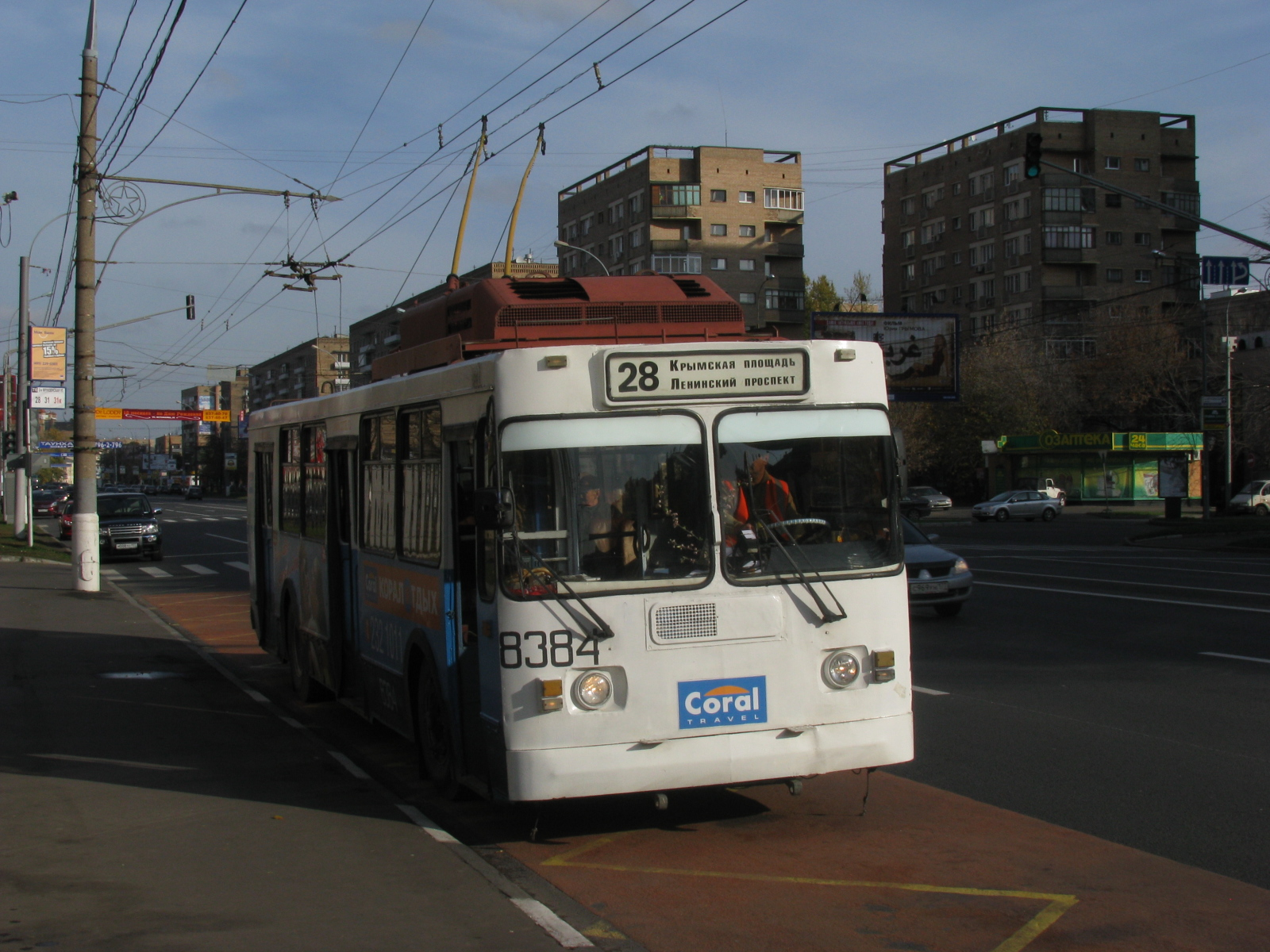 Троллейбус №8384 на 28 маршруте в Москве